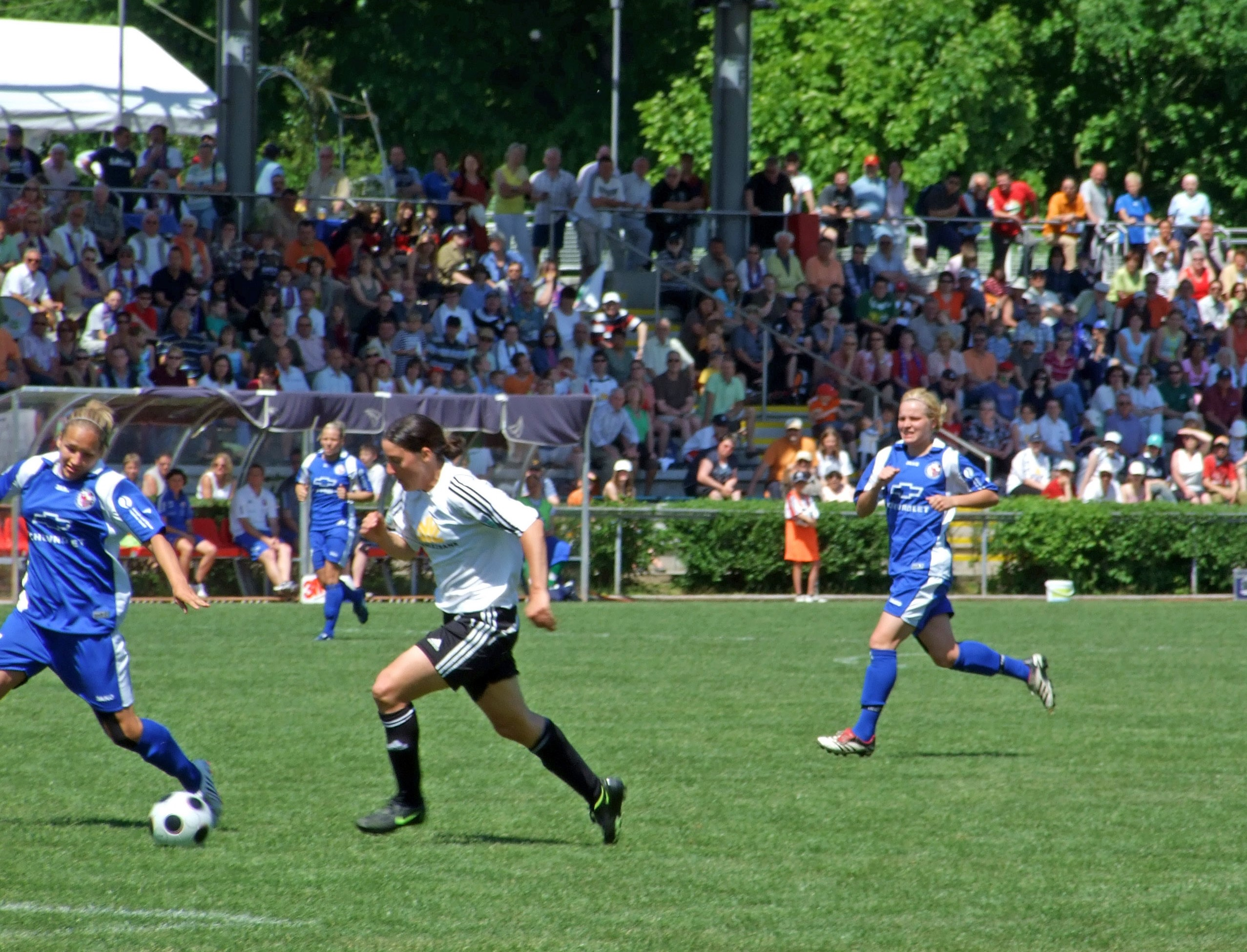 Birgit Prinz vom 1.FFC Frankfurt, 2008